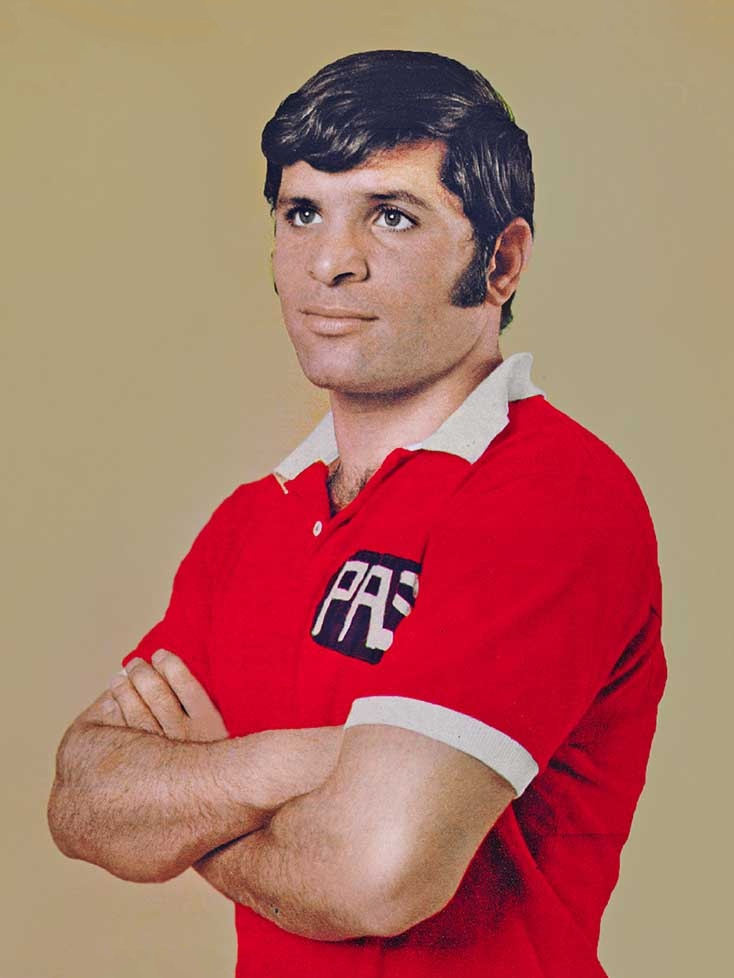 Parviz Ghelichkhani